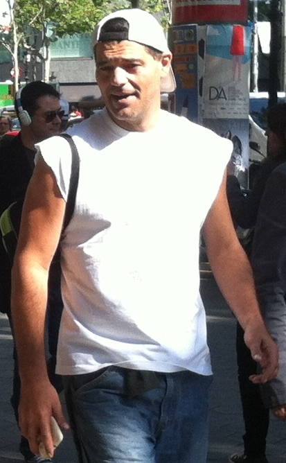 Frank Cuesta durante la Diada de San Jordi (2013).